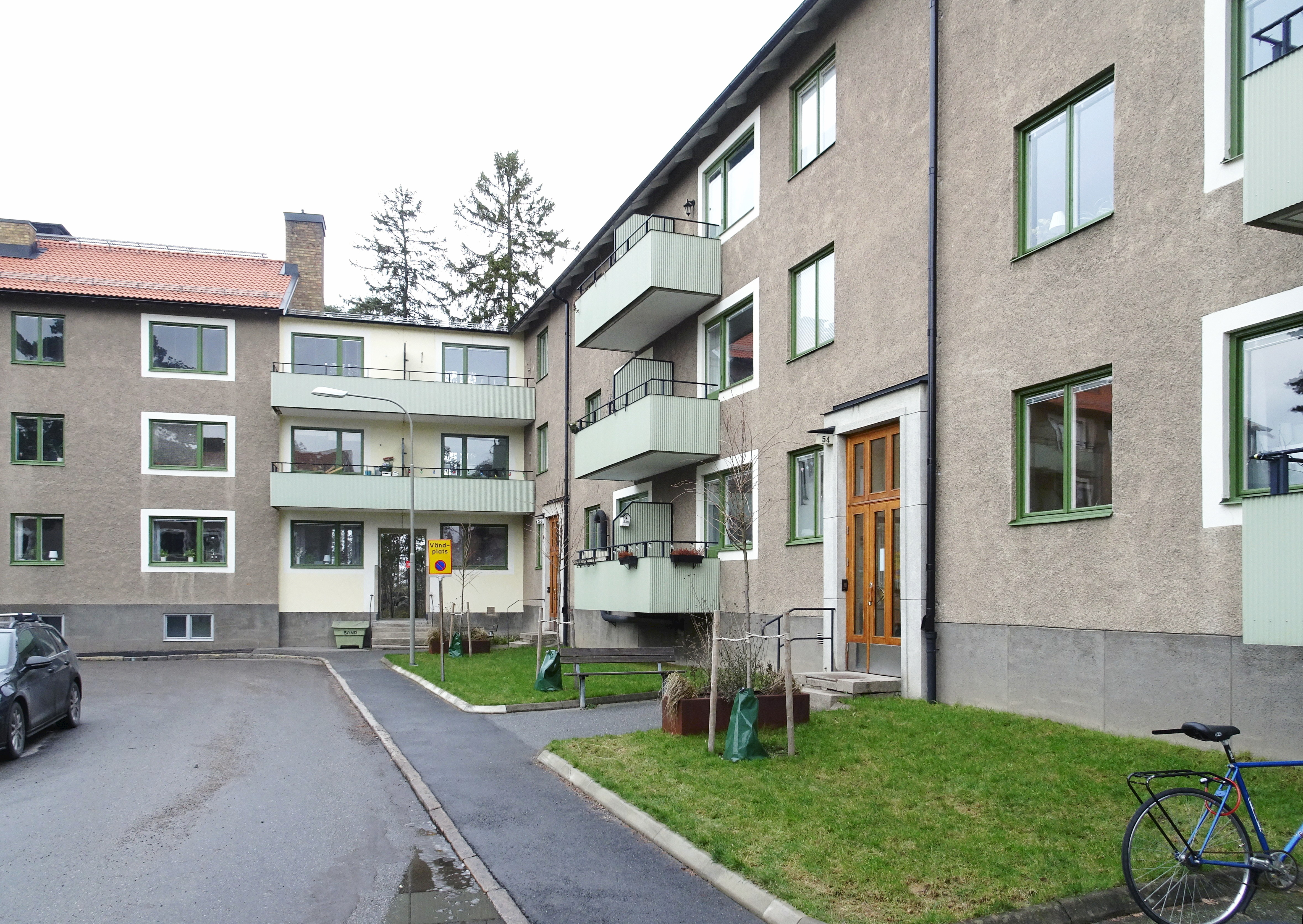 Kvarteret Träsliperiet, Östrandsvägen 58-60, byggår 1949-1953, Björn Hedvall (Arkitekt), Viktor Hanson (Byggmästare), Viktor Hanson (Byggherre)